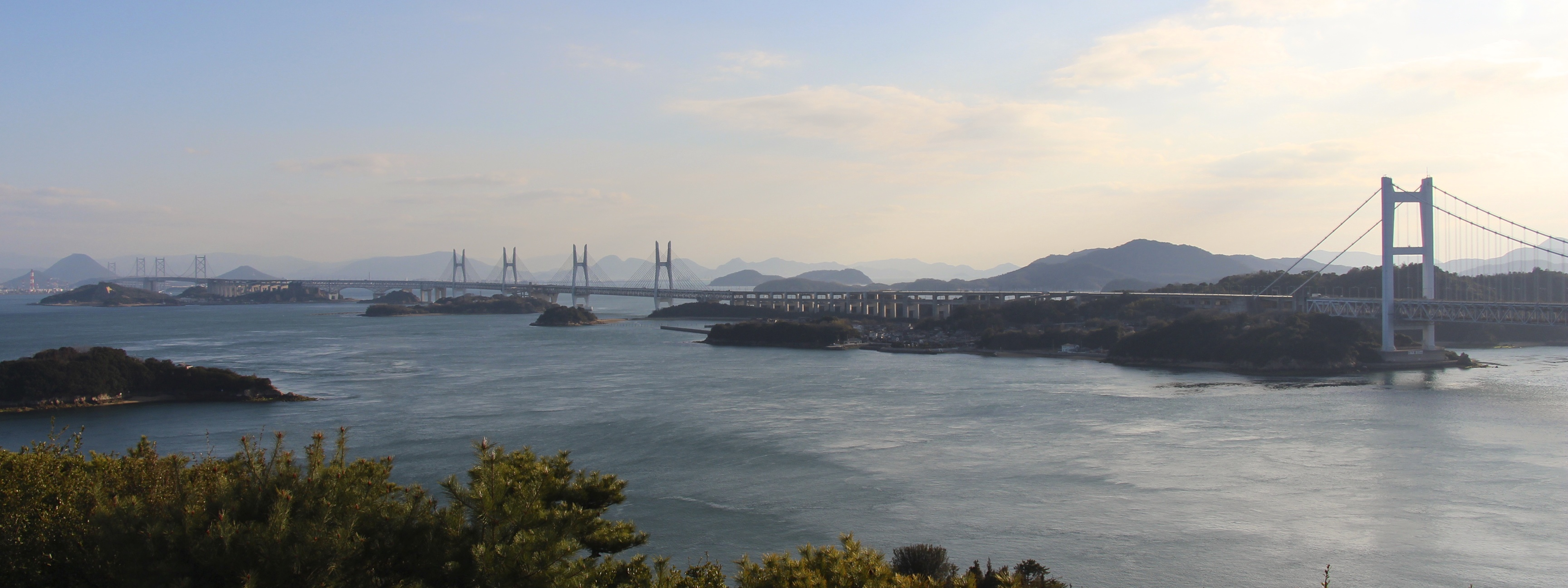 瀬戸大橋 鷲羽山展望台 パノラマビュー